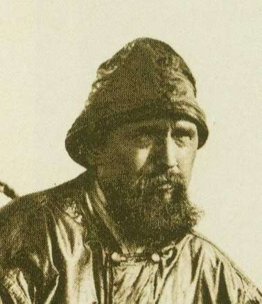 Am Ruder (1891-95)